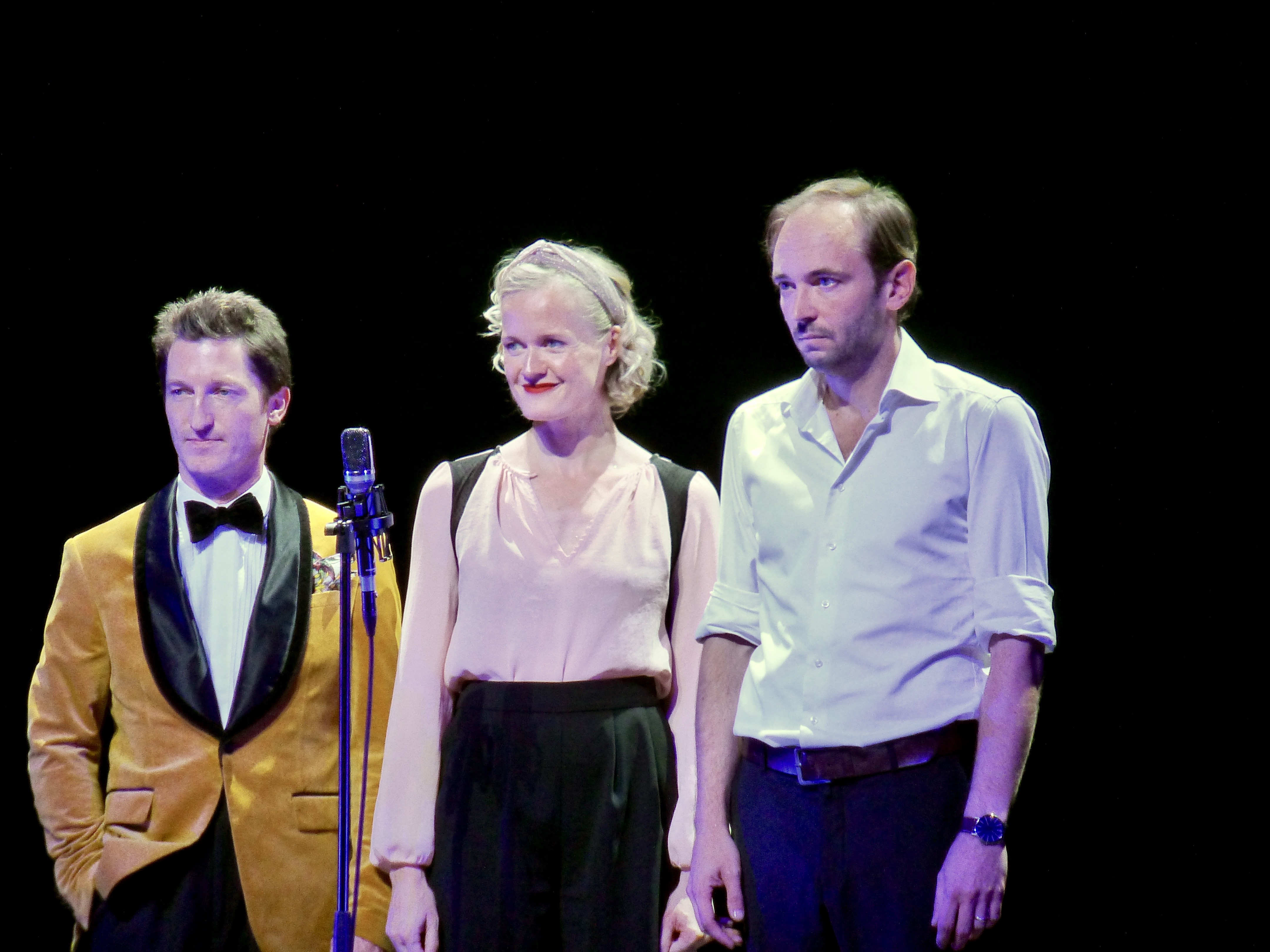 Muttis Kinder im Schauspielhaus Leipzig am 13. September 2019